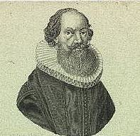 Scan from Johann Christoph Brotze's book Sammlung verschiedner Liefländischer Monumente. M. Ludwig Dunte ... [das Porträt].